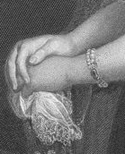 Détail pour illustrer l'article Mouchoir